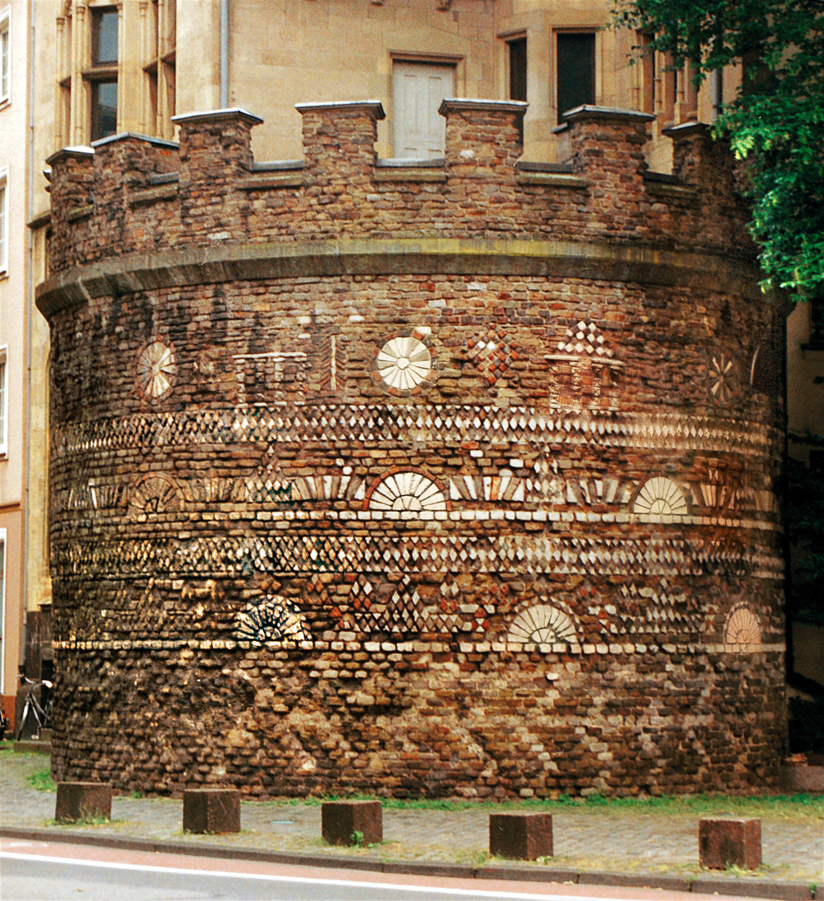 Köln: Turm 13 der römischen Stadtmauer. Der Zinnenkranz wurde 1898 neu aufgemauert und entspricht nicht dem historischen Aussehen, da in der Antike der Abstand zwischen den Zinnen größer war, als damals dargestellt.